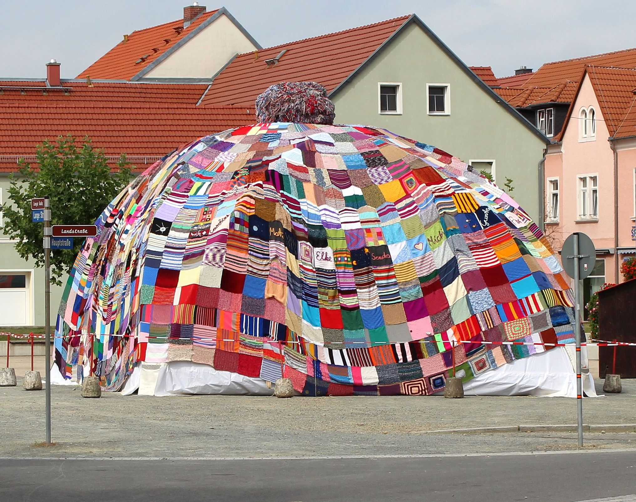 Der Südspitze genannte südliche Teil des Marktes in Elsterwerda mit einer von den Elsterwerdaern Strick- und Häckelfrauen hergestellten Riesenmütze, welche ein letztlich wohl gescheiterter Versuch war, ins Guinness-Buch der Rekorde zukommen. Die aus 1051 Einzelteile bestehende Mütze war 159,45 Quadratmeter groß und bei der Wiegung am 6. September 2013 222 Kilogramm schwer. Davon brachte allein die Bommel mit einem Durchmesser von 1,40 Metern 92 Kilogramm auf die Waage.